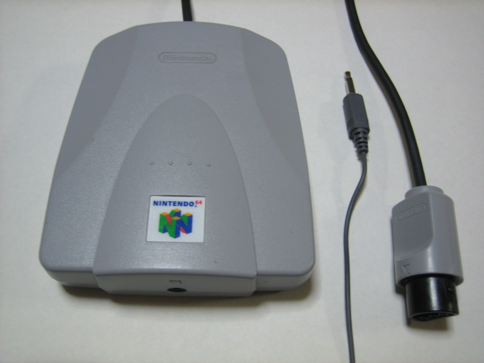 NINTENDO64_VRS_NUS-020